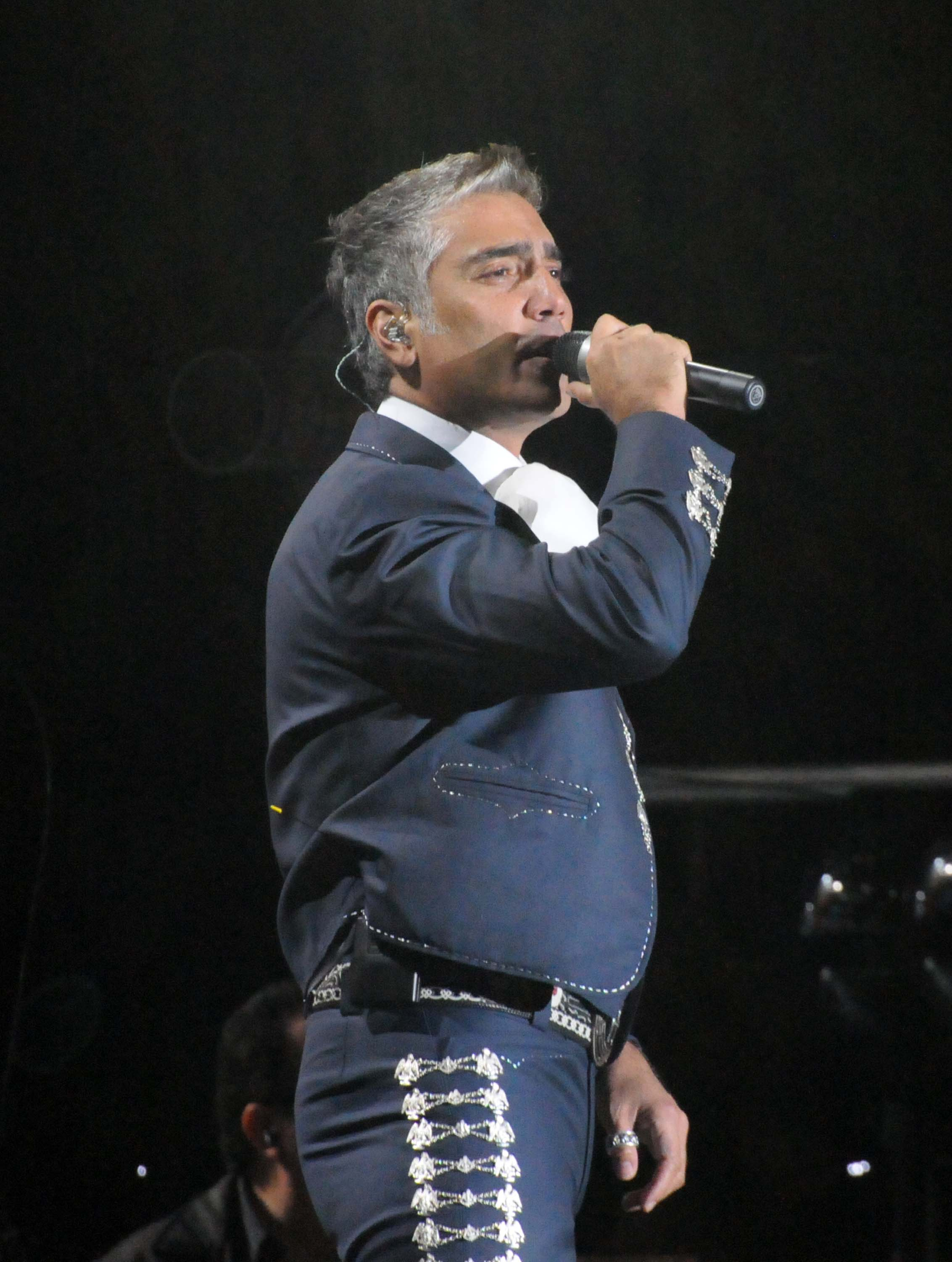 Fotografía gentileza de Patricio González.